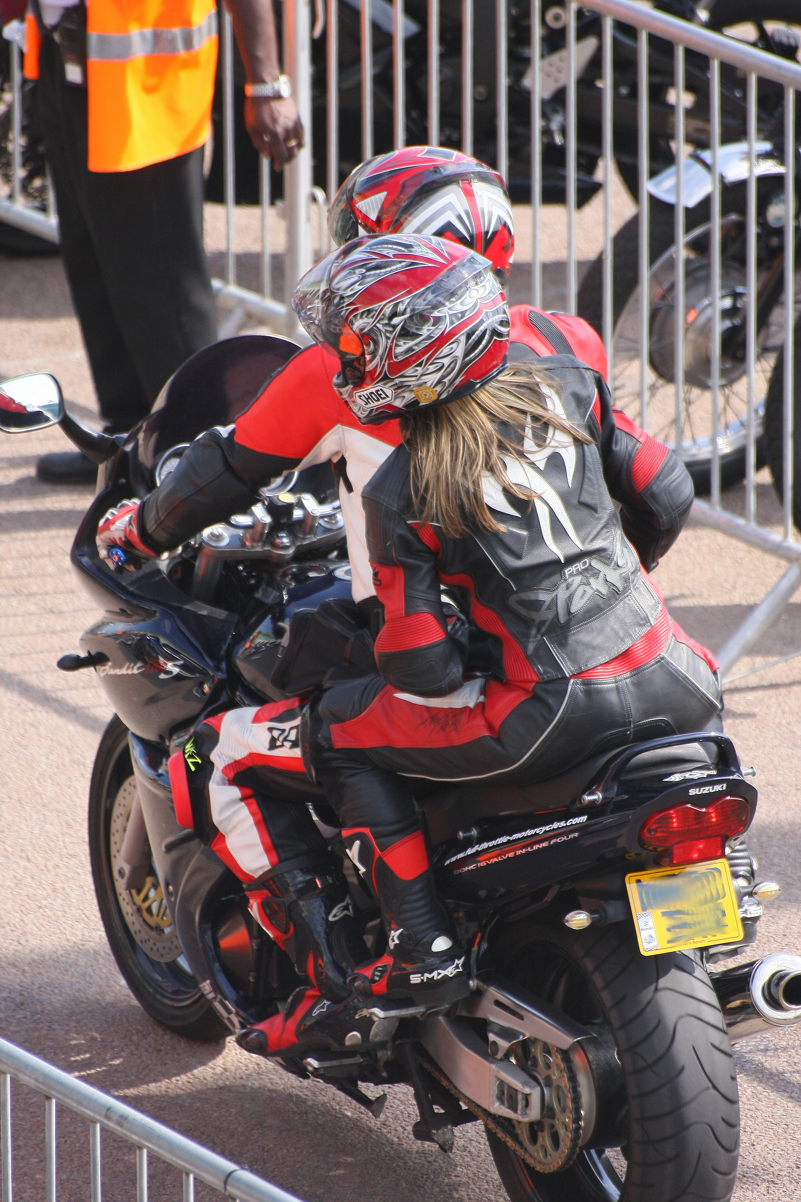 2008 Ace Cafe Reunion